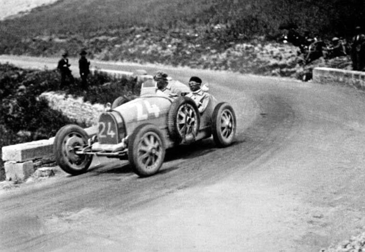 Emilio Materassi su Bugatti 35c durante la Targa Florio del 1927